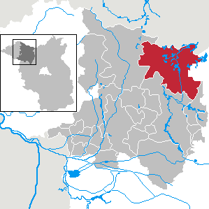 Rheinsberg in Brandenburg (Country) - District Ostprignitz-Ruppin